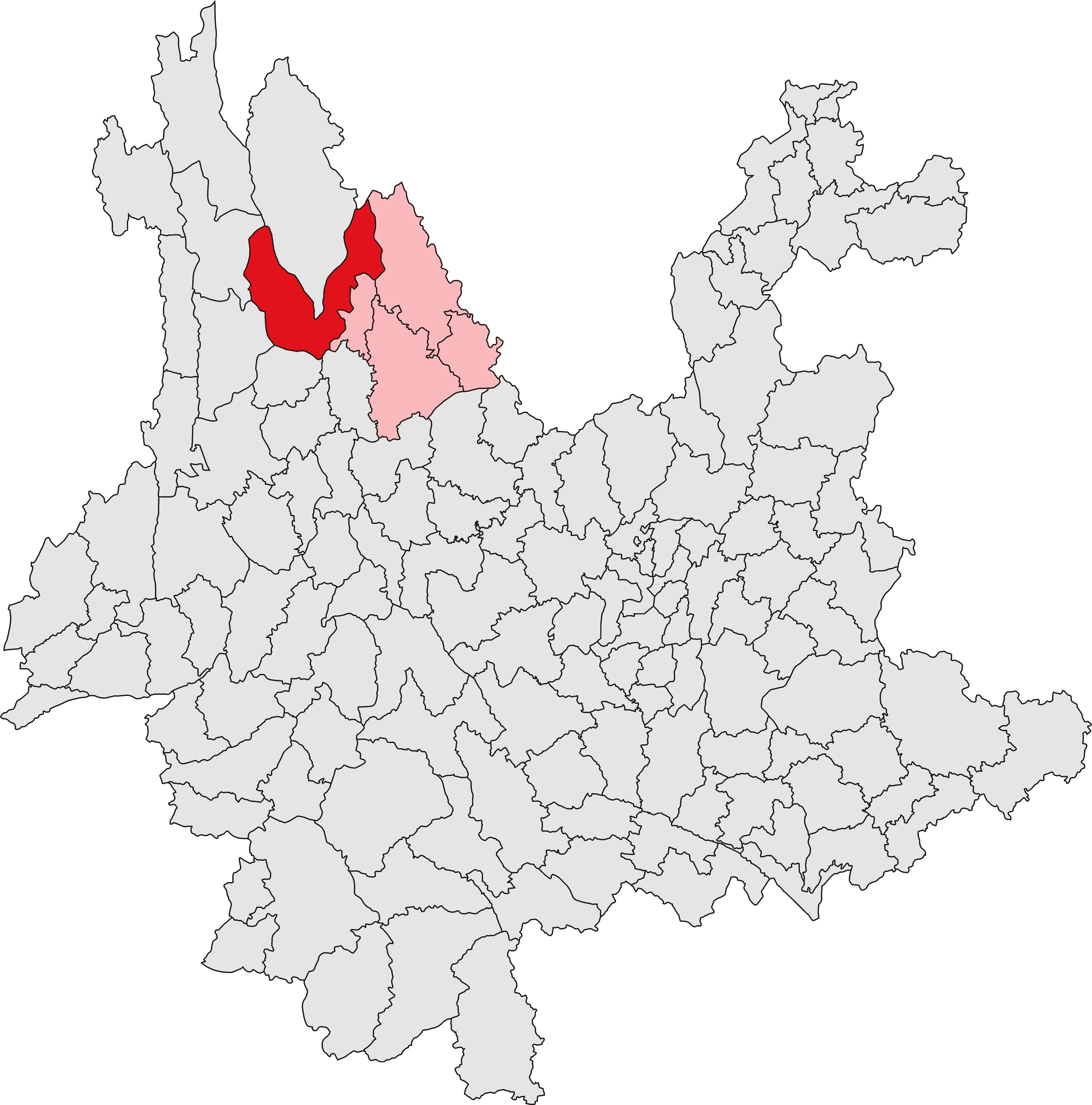 中文（中国大陆）: 玉龙纳西族自治县位置图